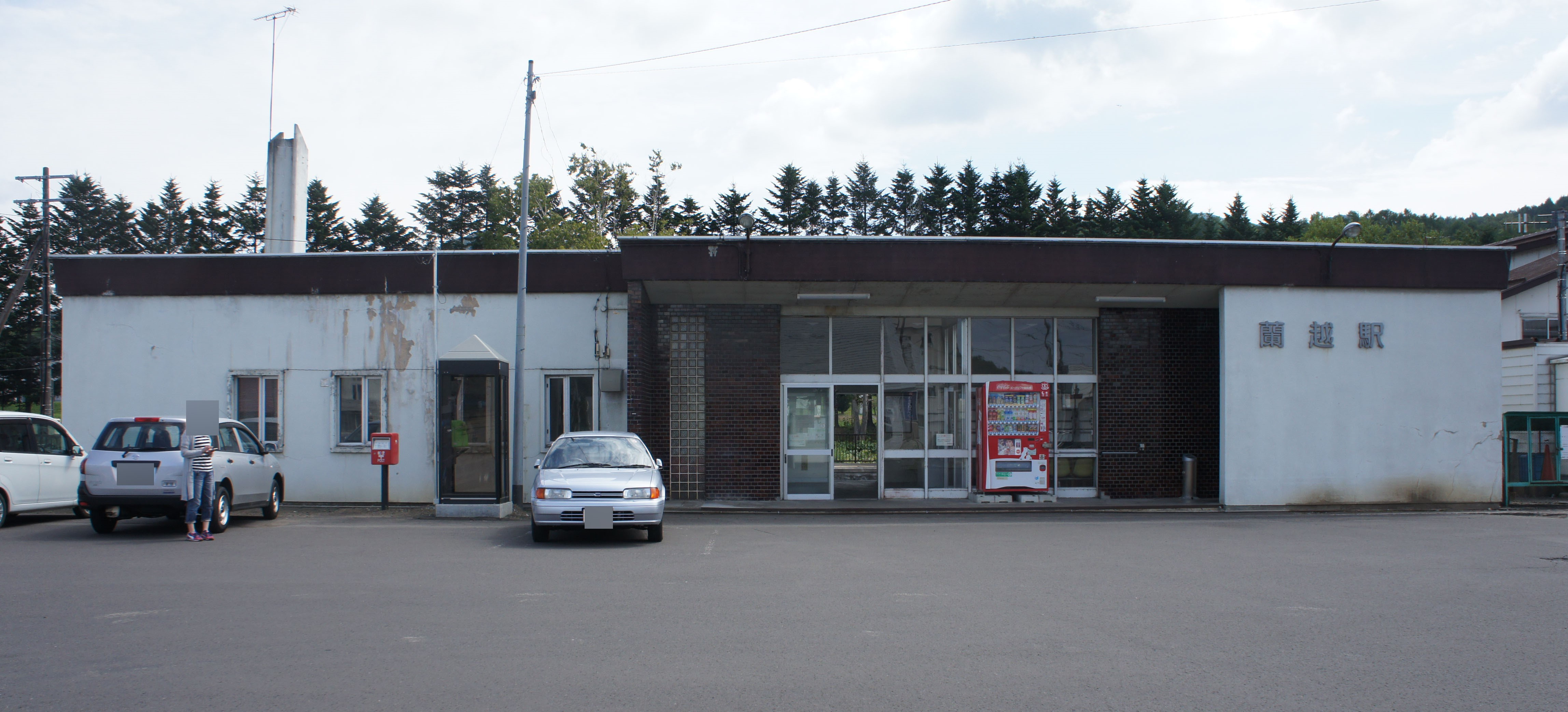 JR函館本線・蘭越駅の駅舎 Sony NEX-3